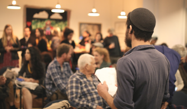 אירוע שירה בבית אורי צבי